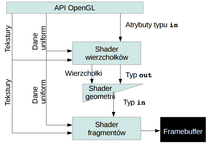 Schemat blokowy przepływu informacji w protokole programowalnym OpenGL w wersji 3.3.